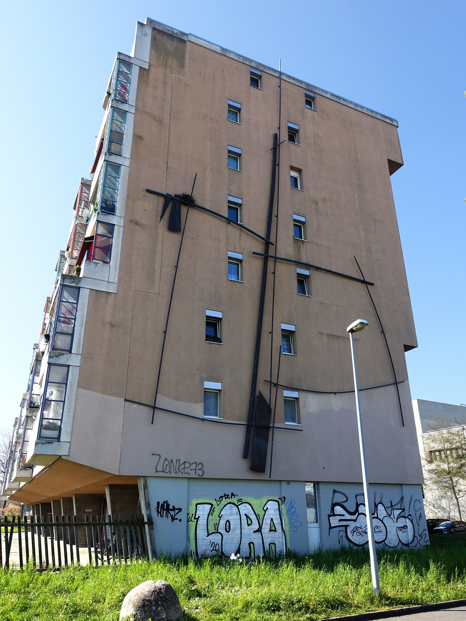 Elsässerstrasse 41/53, Basel. Gestaltung der Giebelfassade Nord (1986-1988) von Daniel Gaemperle (1954), Maler, Grafiker